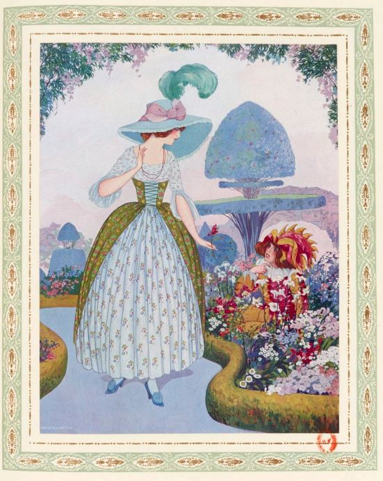 Illustration dans l'ouvrage La nuit vénitienne, Fantasio, Les caprices de Marianne d'Alfred de Musset, édition de 1913 (BNF/gallica)